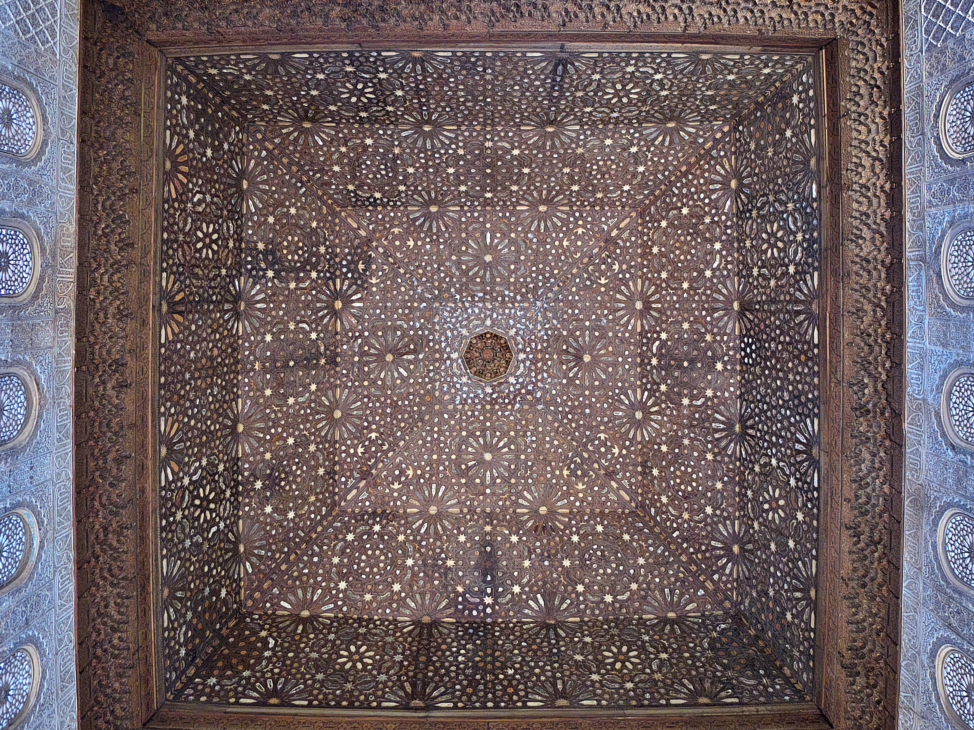 La principal obra de carpintería de los palacios nazaríes, segundo tercio del siglo XIV.